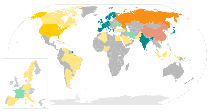 l’Algérie a une agence spatial